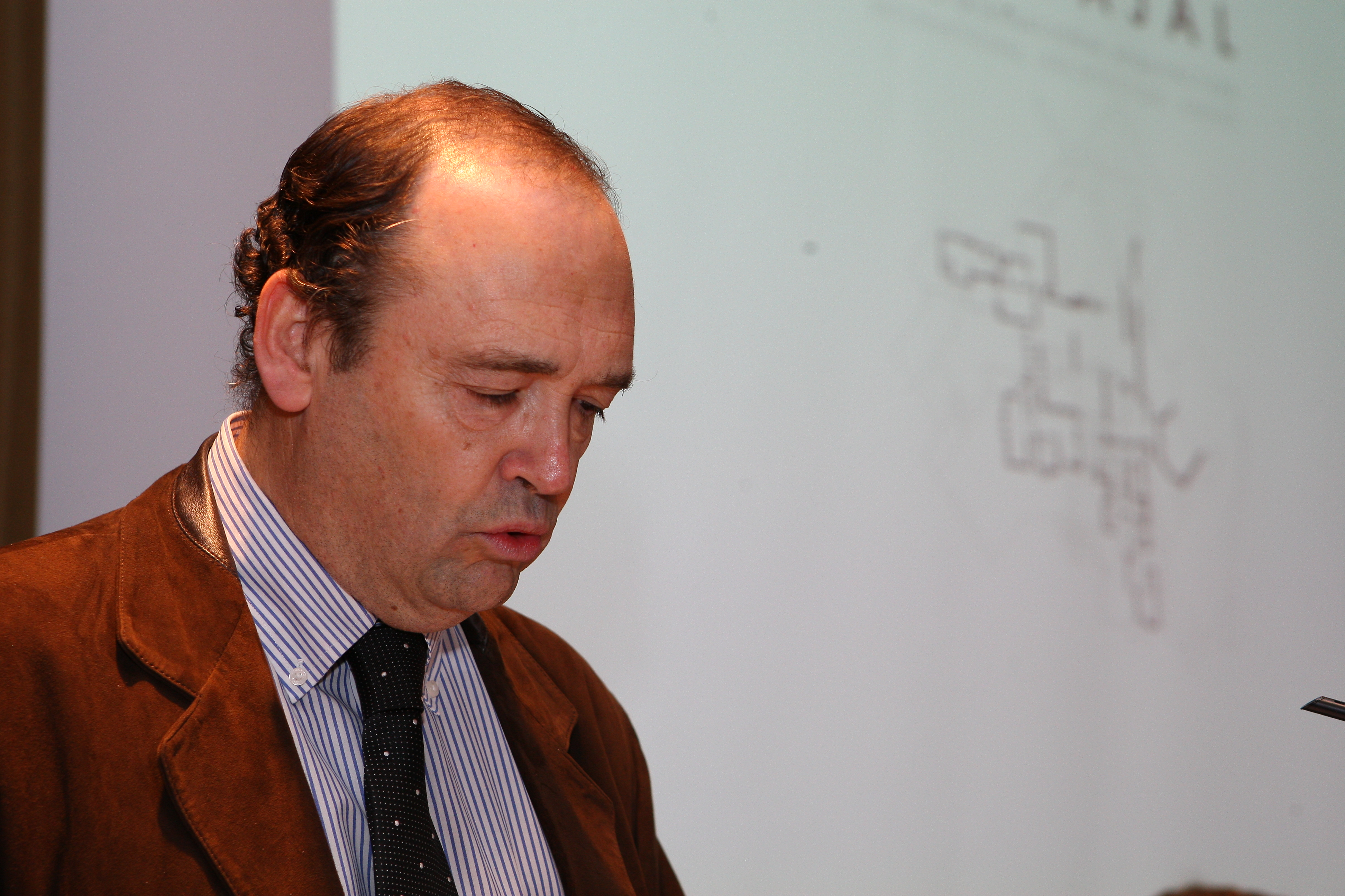 arquitecto español